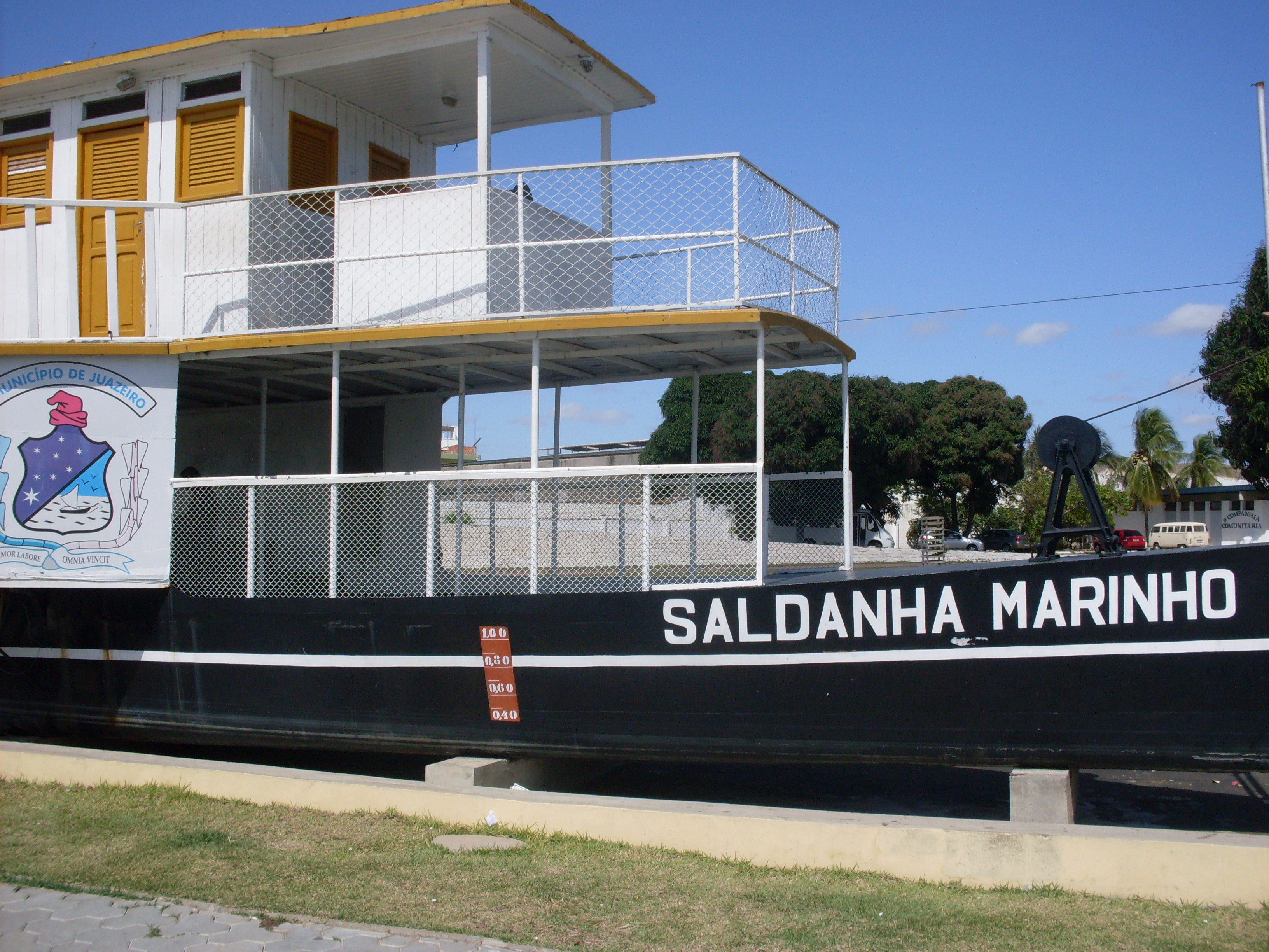 Santo Antonio, Juazeiro - BA, Brazil